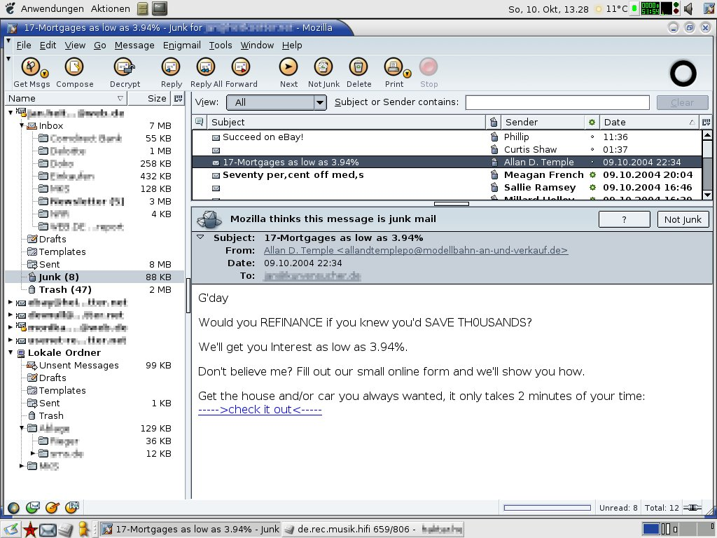 Mailkomponente von Mozilla 1.6 mit dem Thema "Orbit 3+1"